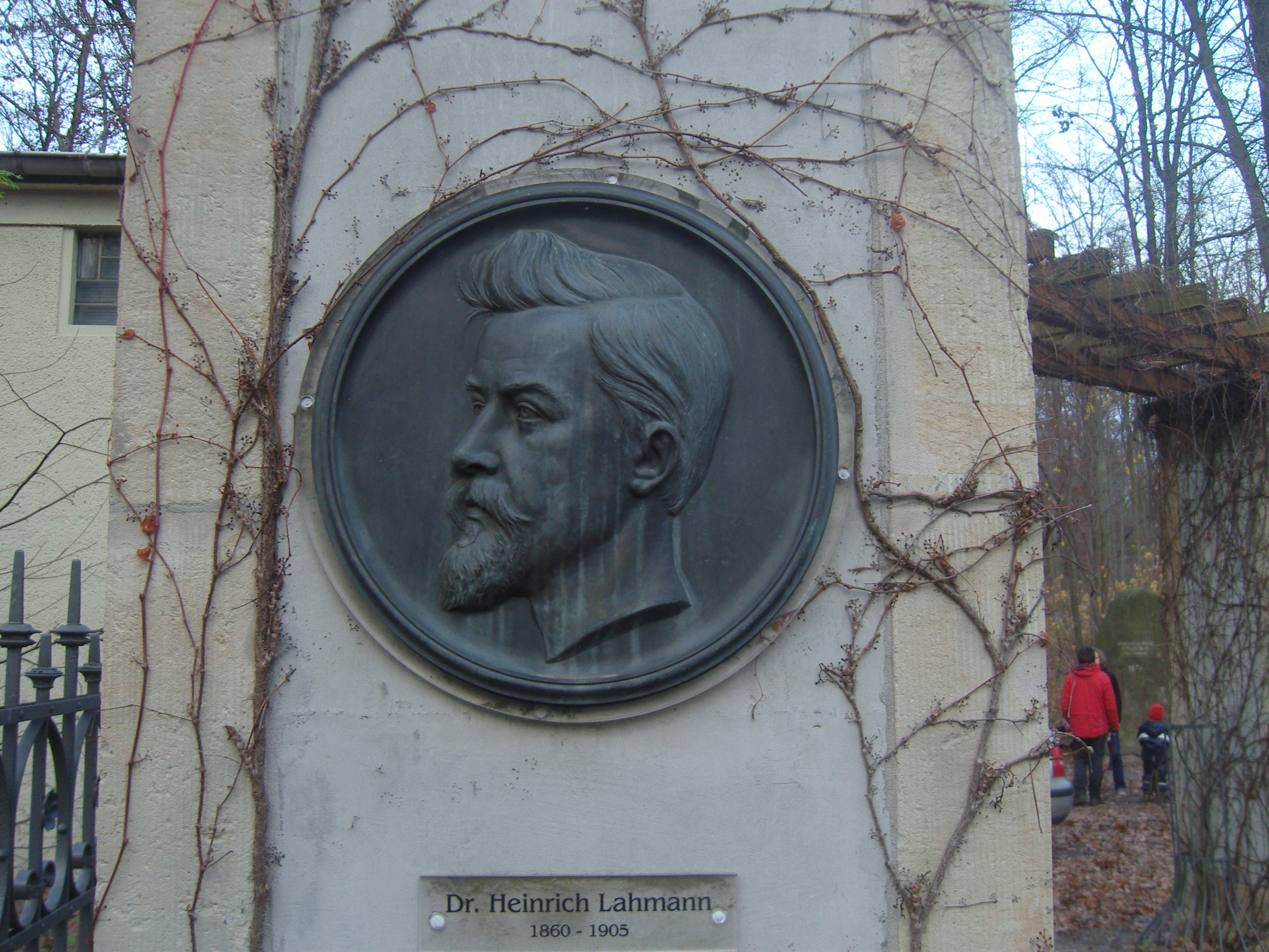 Medaillon mit dem Bildnis Lahmanns am Eingang zum Konzertplatz am Stechgrund, Dresden-Weißer Hirsch